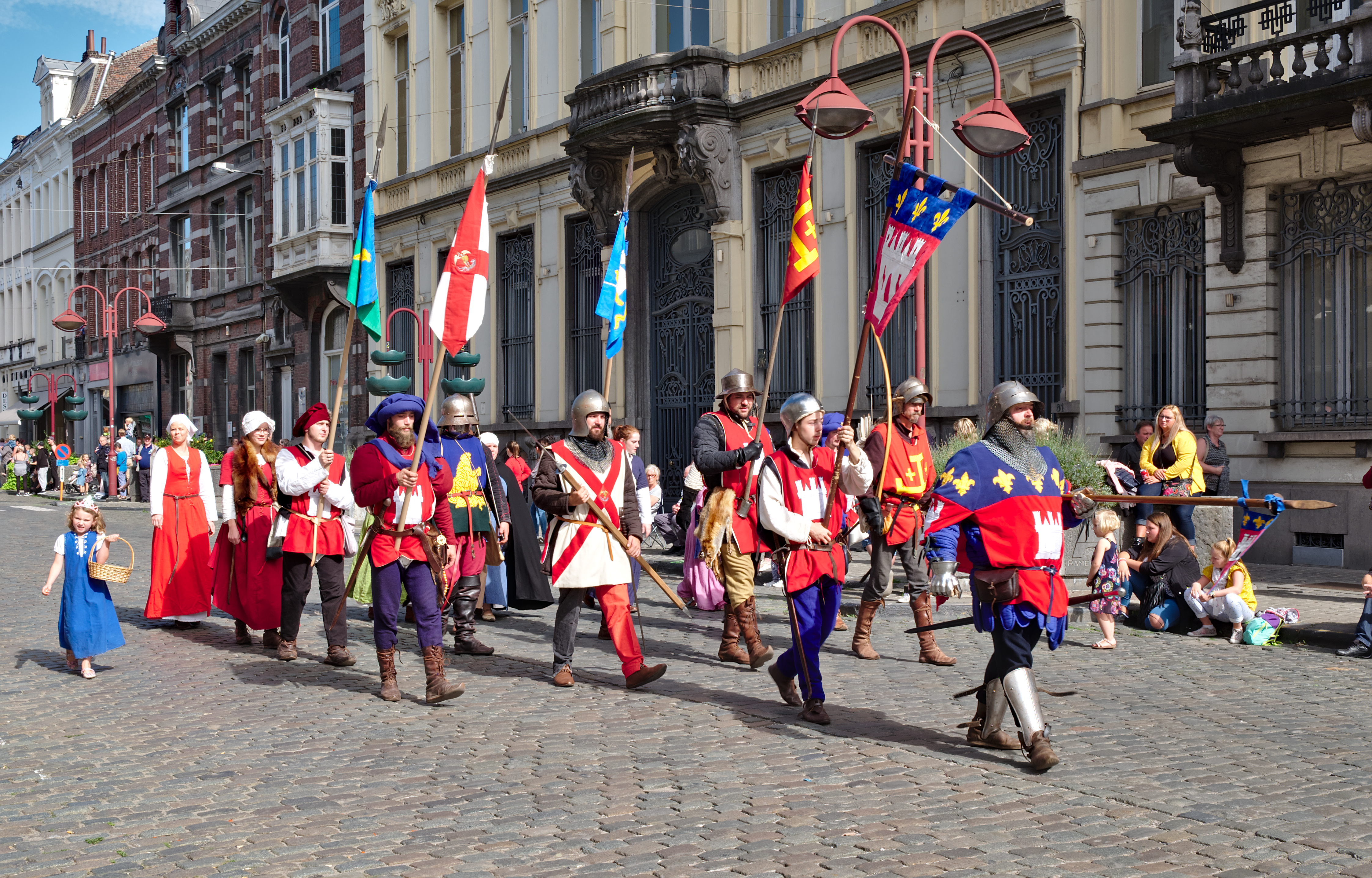 Grande Procession de Tournai: Groupe des Serments This photo of immaterial heritage has been taken in the Walloon Region